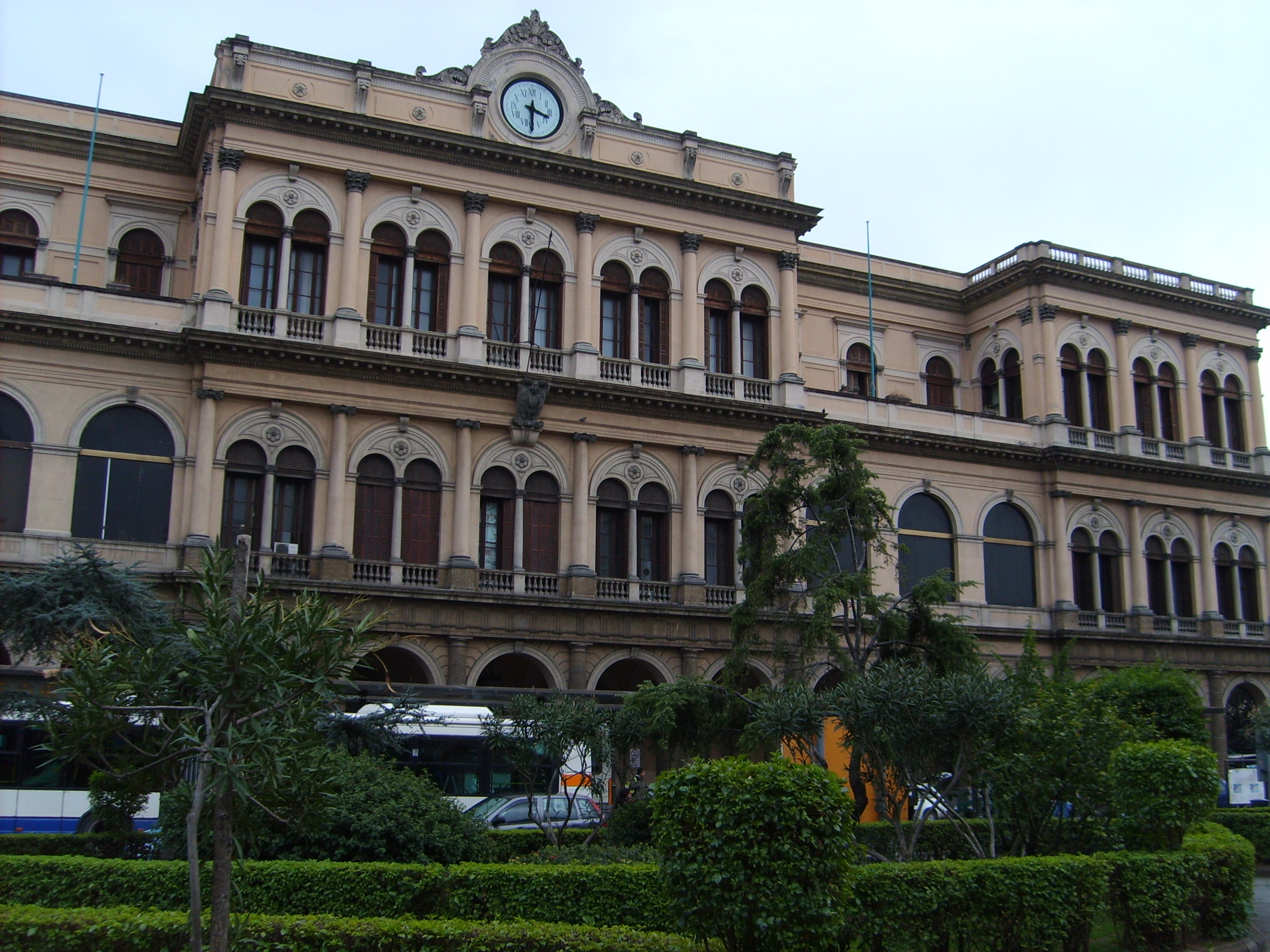 stazione FS di Palermo Centrale